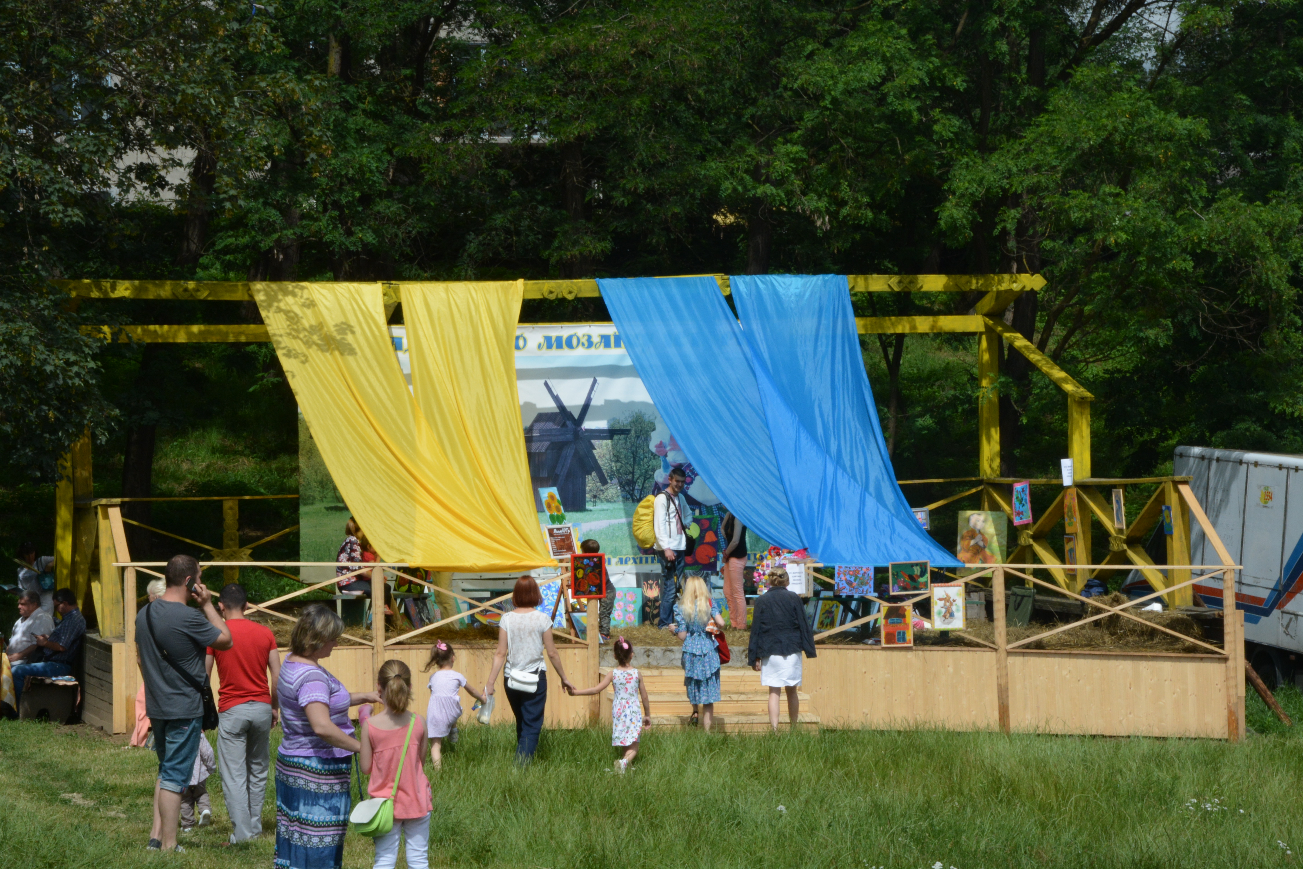 "Мистецька шіфа". Обнова-фест (автор В.Кияшко)